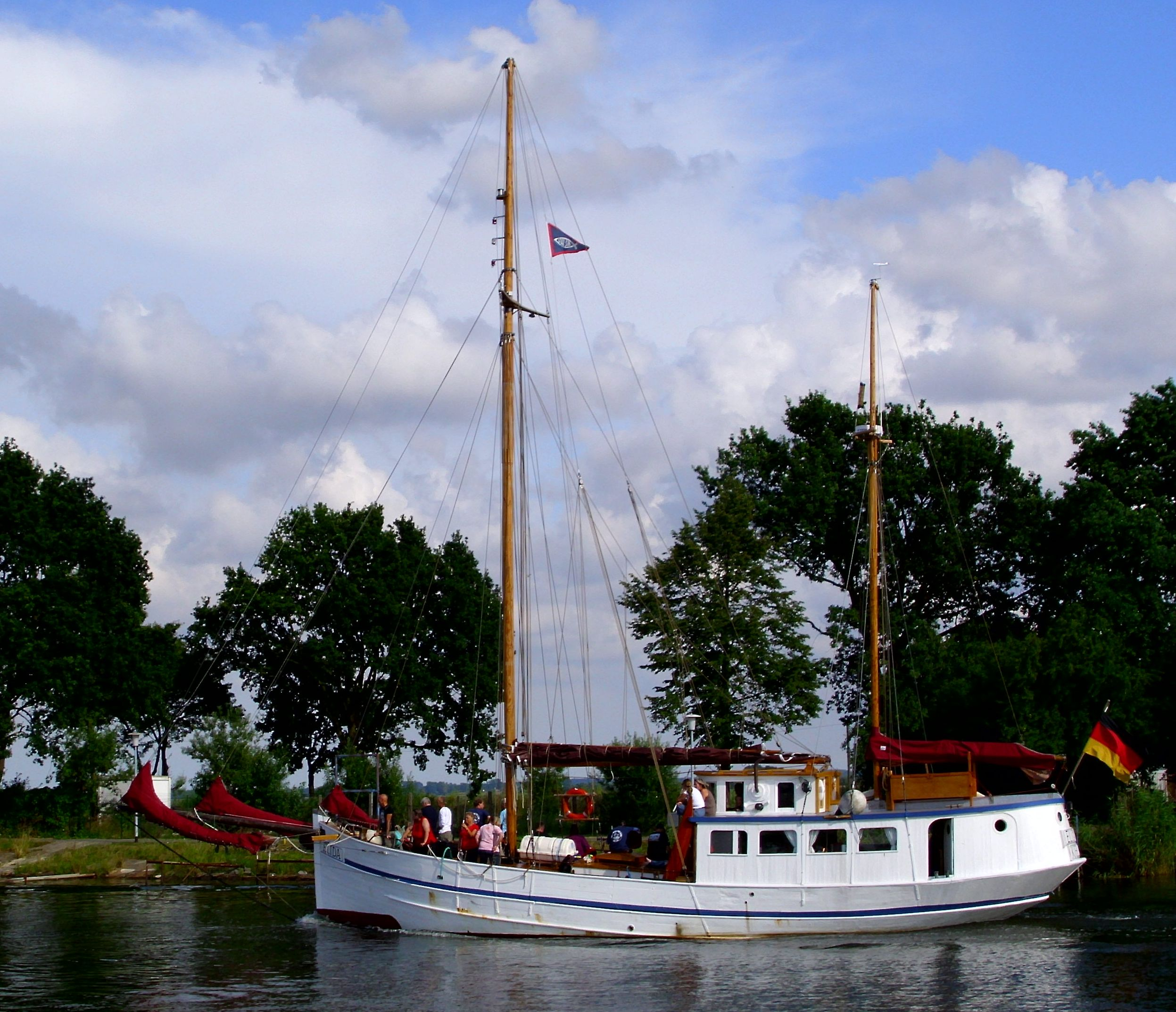 Elida in der Hafenausfahrt von Greifswald